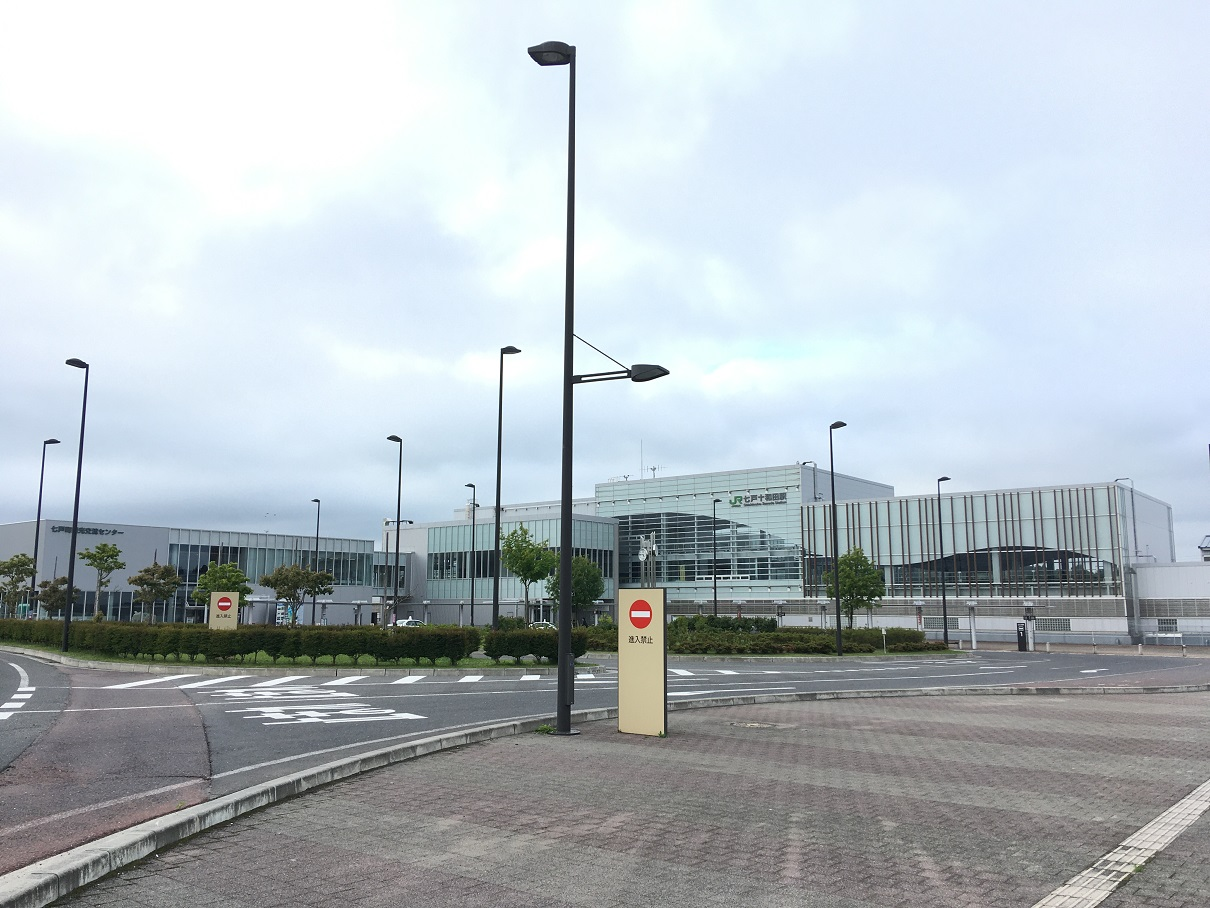 七戸十和田駅南口駅舎